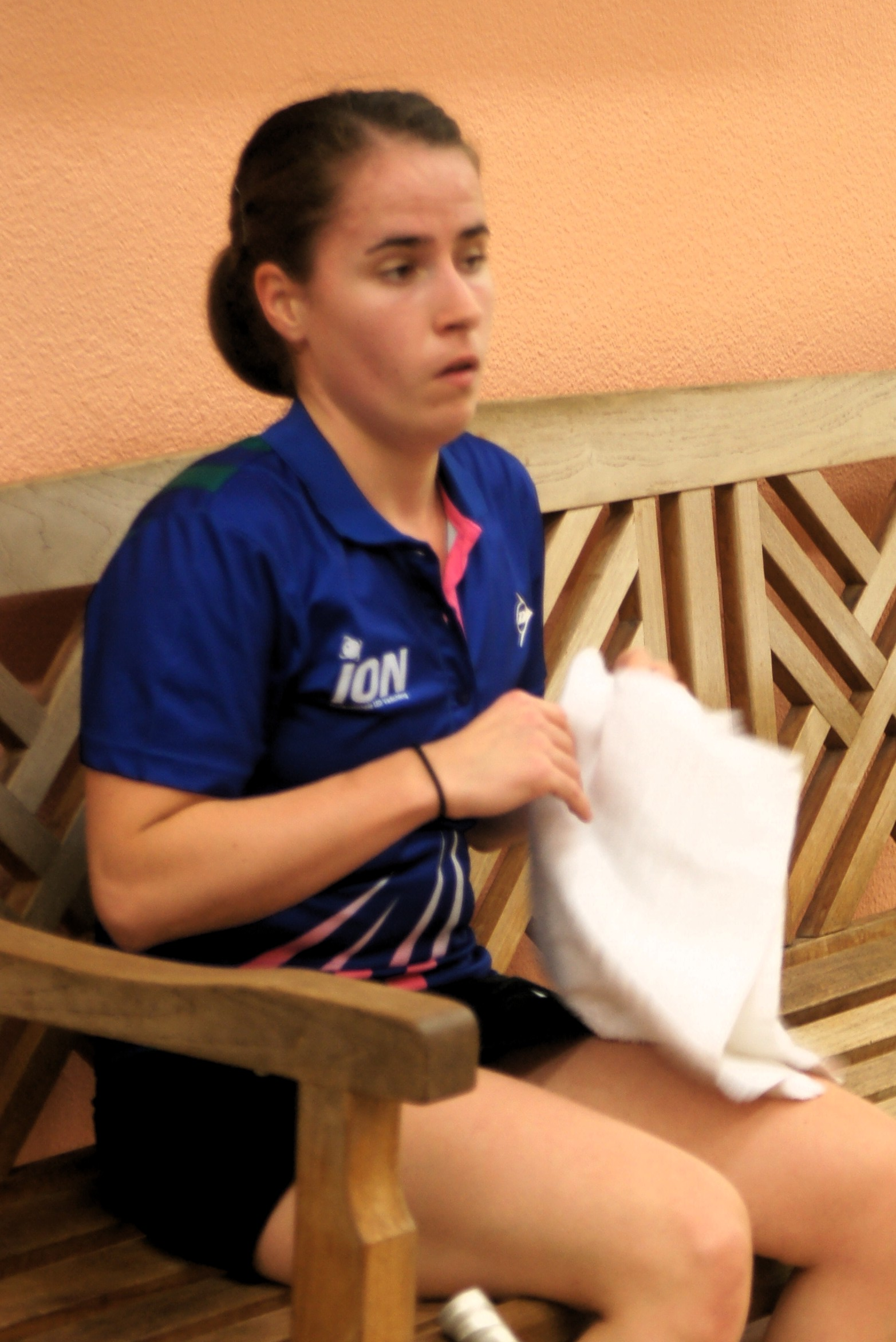 Milou van der Heijden, Monaco Squash classic 2016